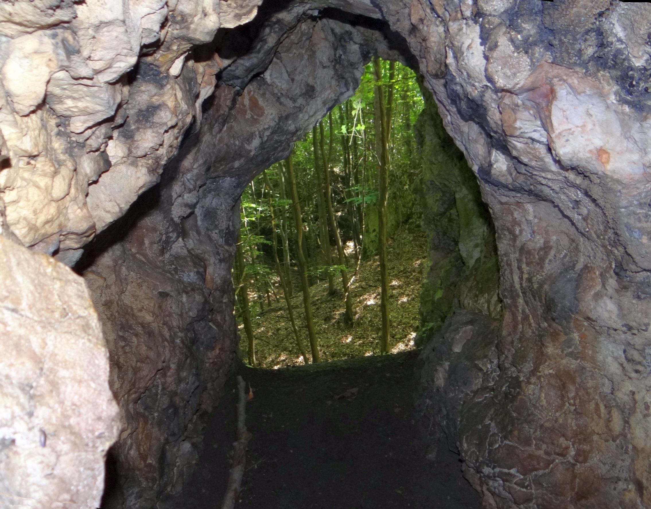 Jaskinia przy Kamyku (Jaskinia Pańskie Kąty) w Nielepicach